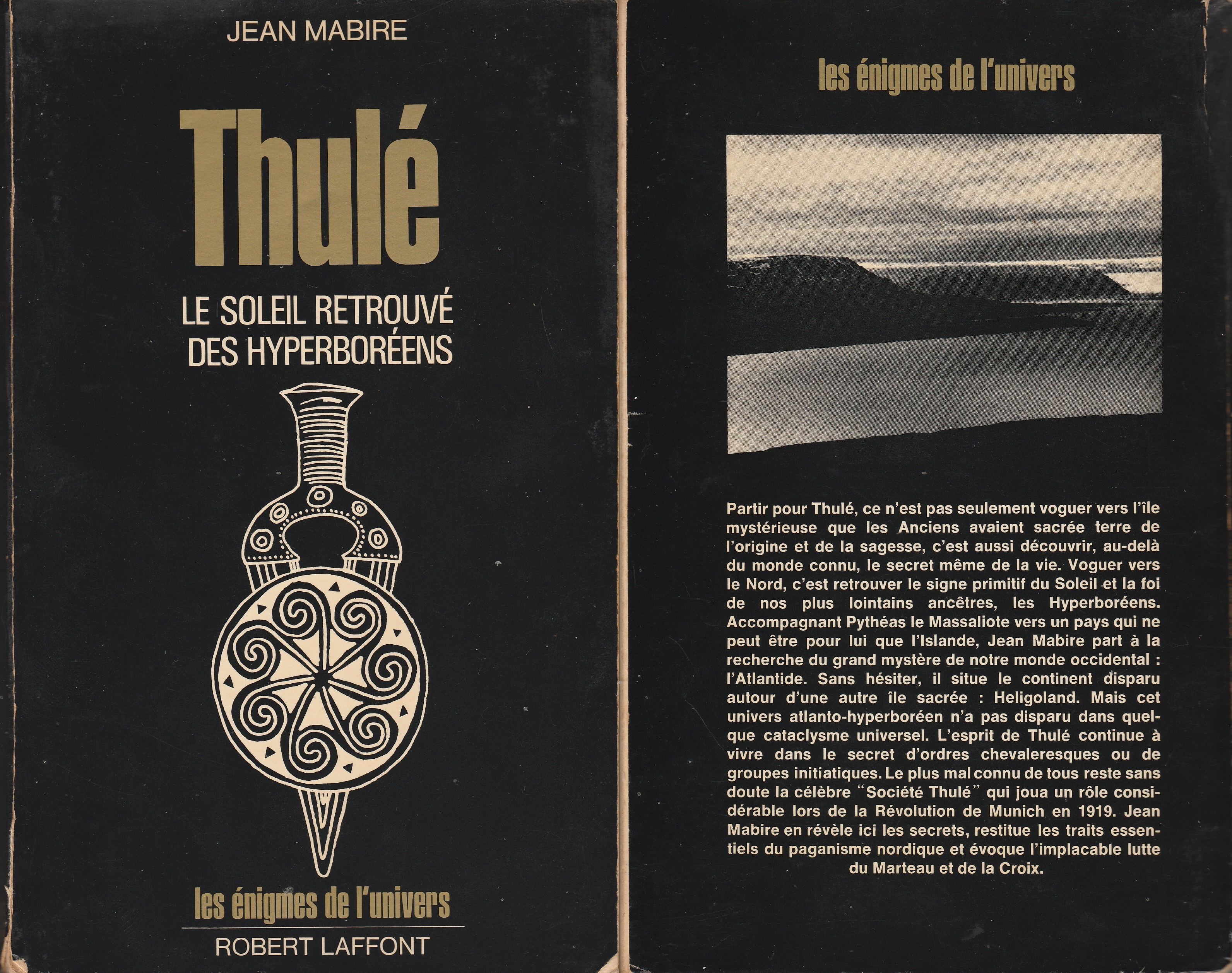 Couverture de "Thulé, le soleil retrouvé hyperboréen" de Jean Mabire